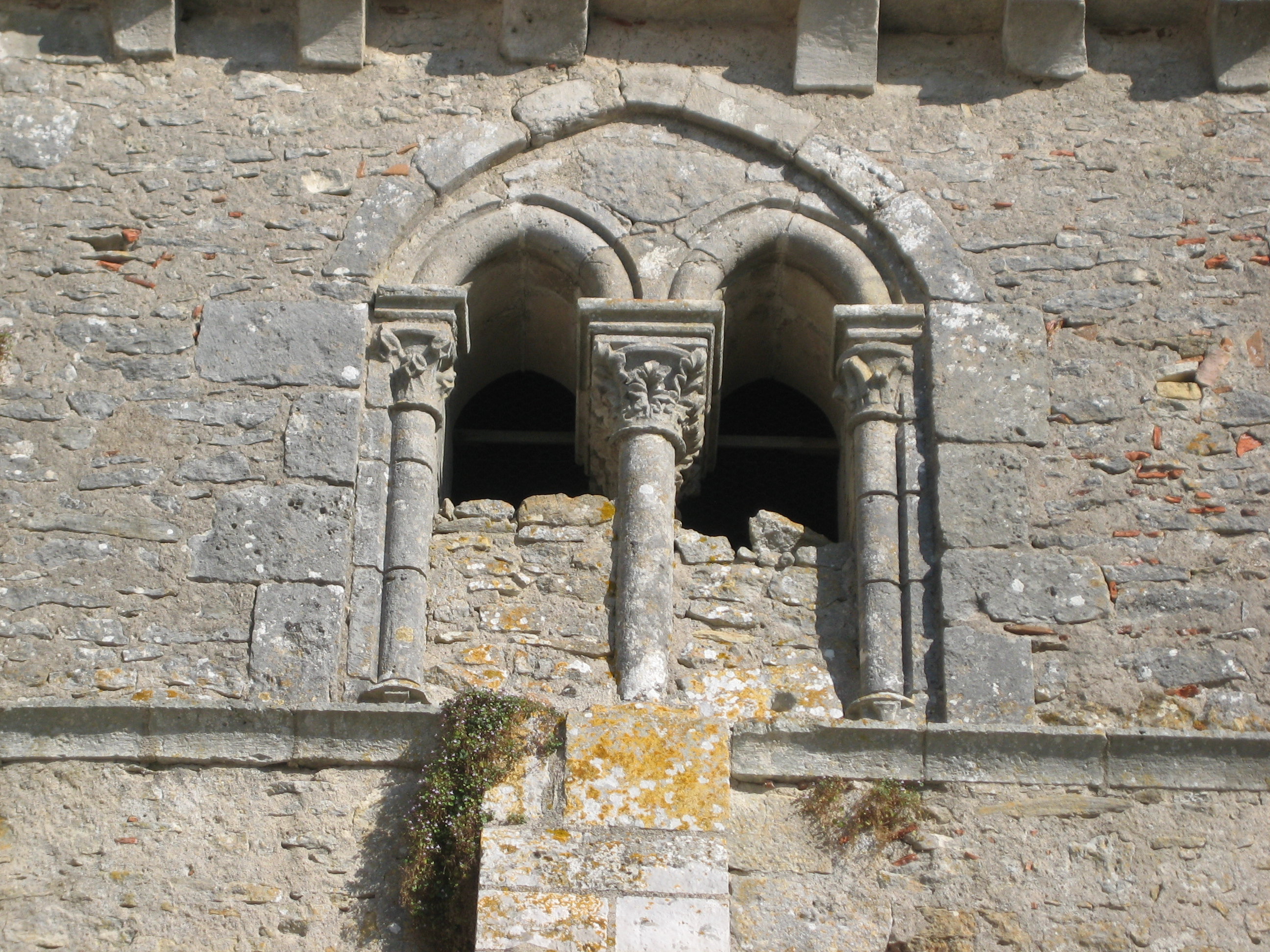 Église Saint-Martin de Montlouis (Cher). XIIe et XIIIe siècle, restauration au XIXe siècle